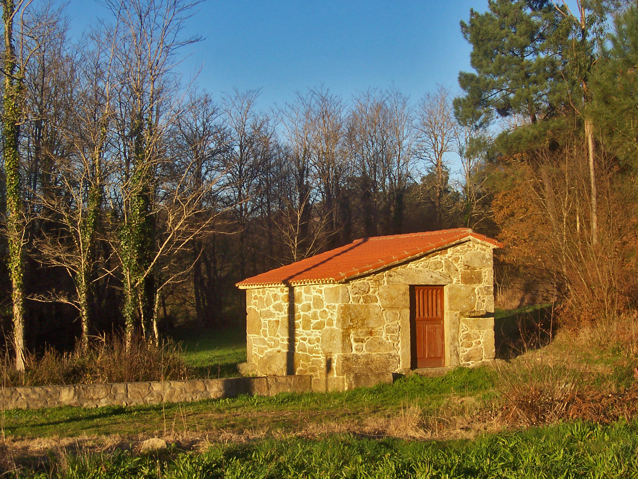 Muiño de Covas (Ames)